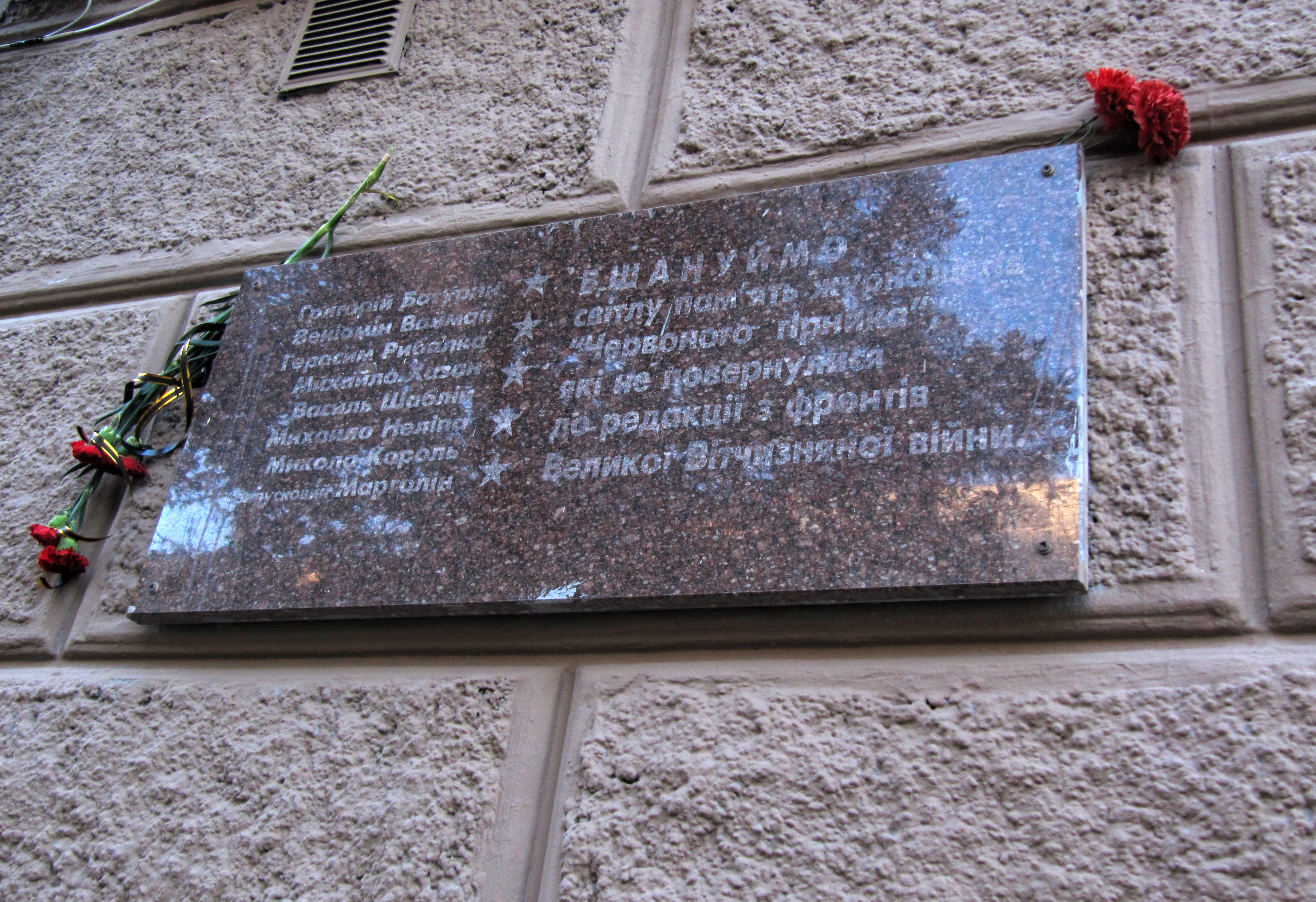 Житловий будинок (1952р.), проспект Карла Маркса, 19. Меморіальна дошка журналістам газети "Червоний Гірник", що не повернулися з фронту